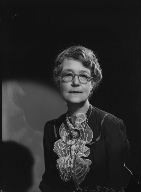 Jean Mann